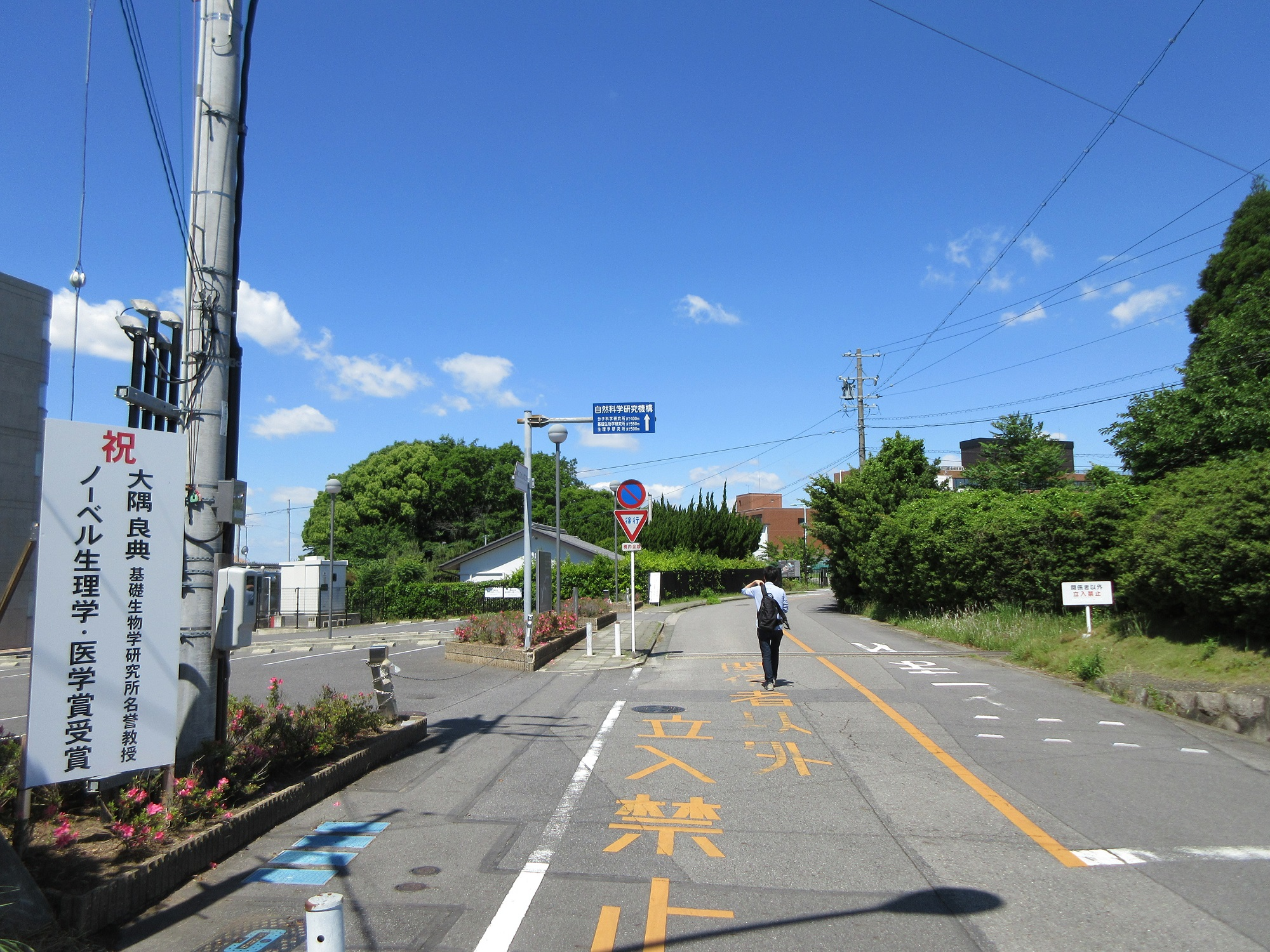 自然科学研究機構（愛知県岡崎市）